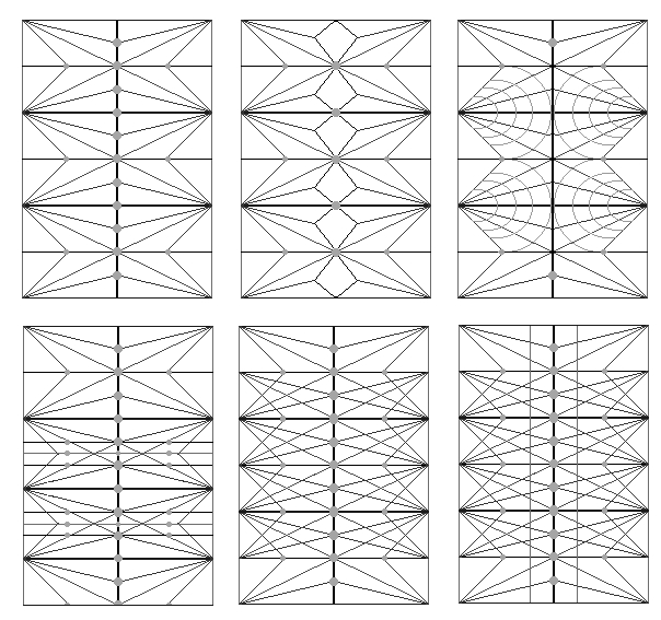 Категория:готическая архитектура